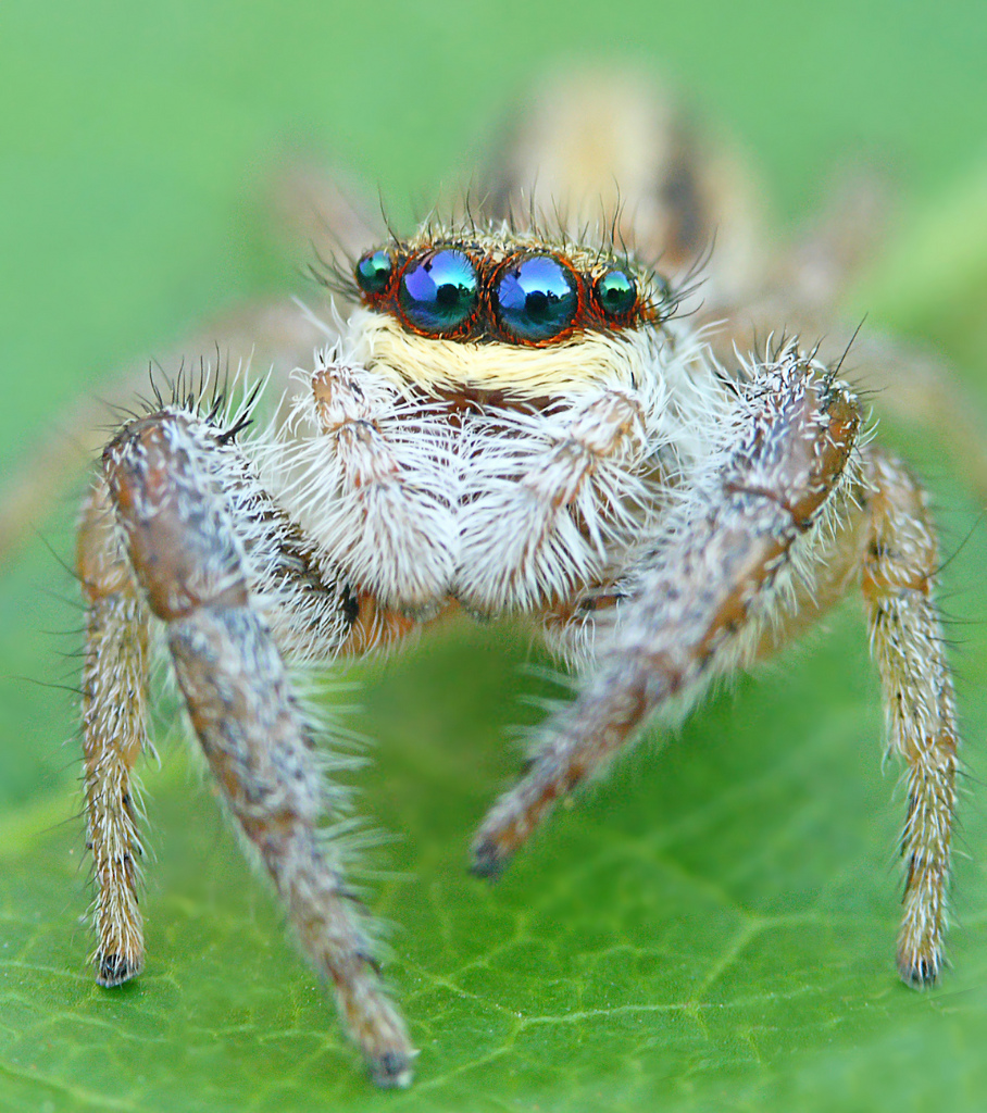 Jumping spider - Marpissa radiata